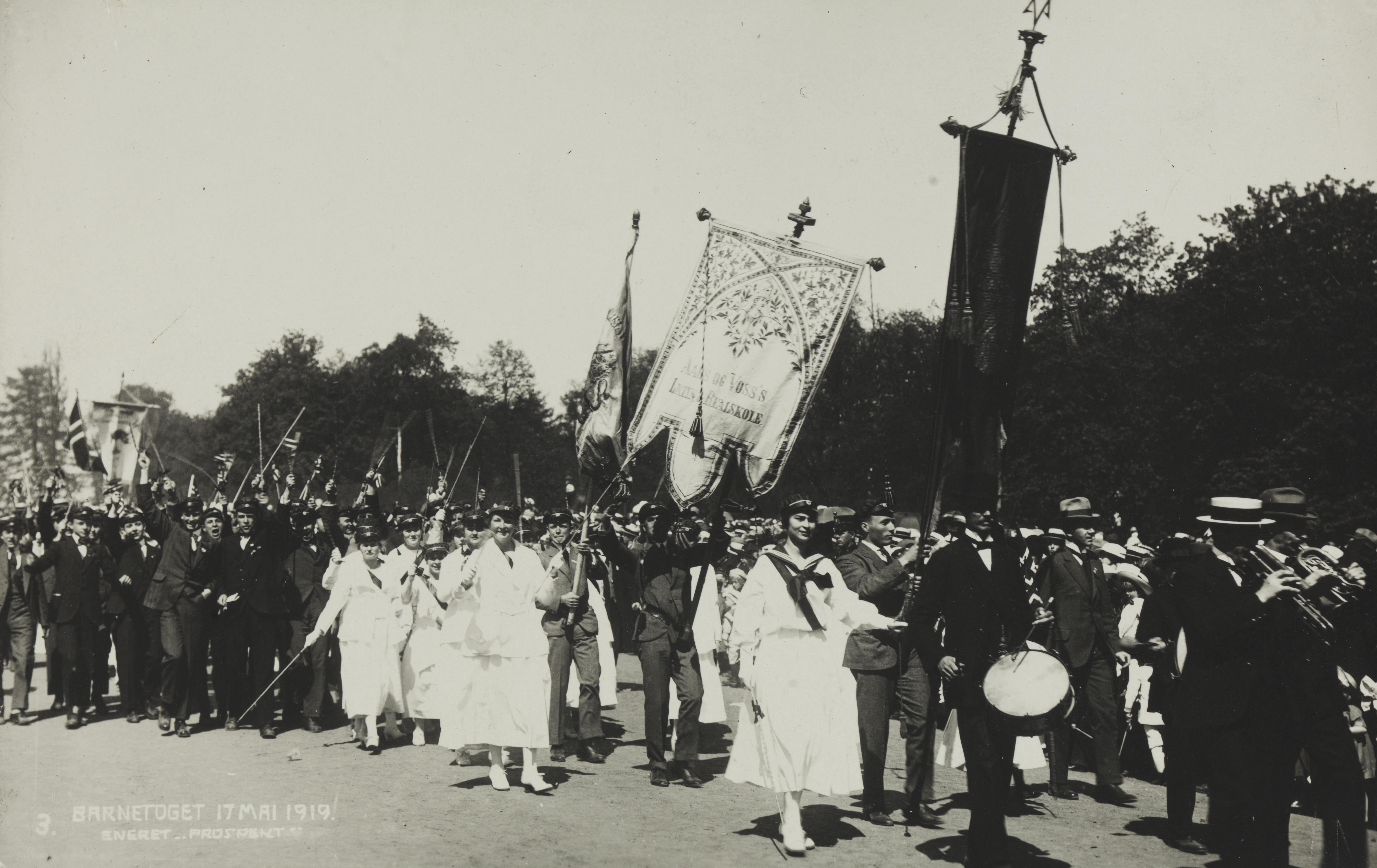 Bildet er hentet fra Nasjonalbibliotekets bildesamling